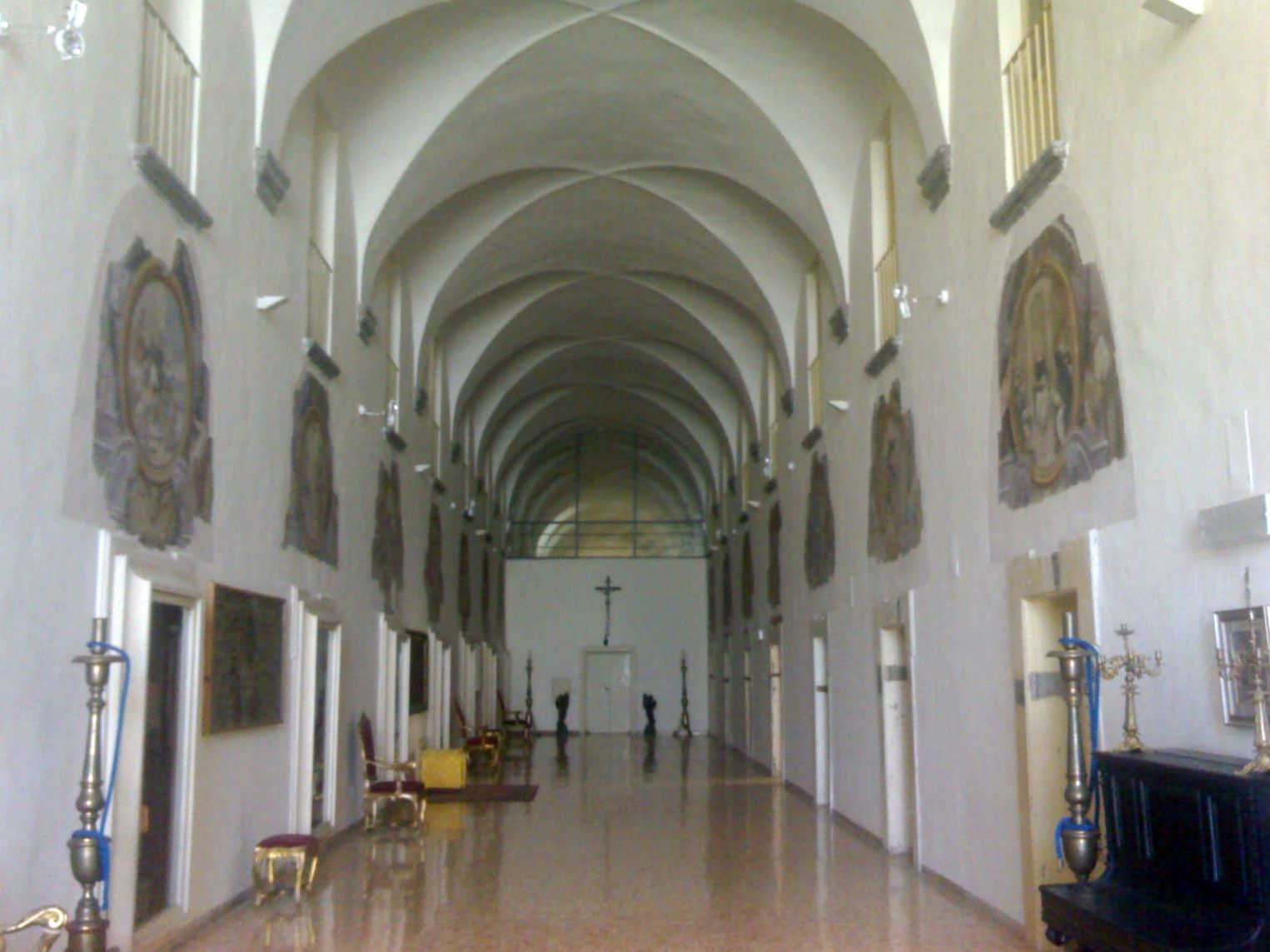 Convento di san Domenico Maggiore (Napoli) - Primo piano (alcune sale)